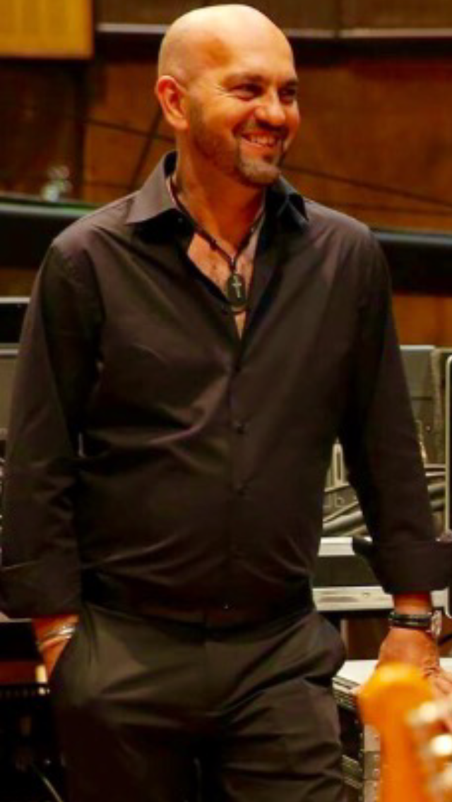 A kép Rácz Lászlót ábrázolja.